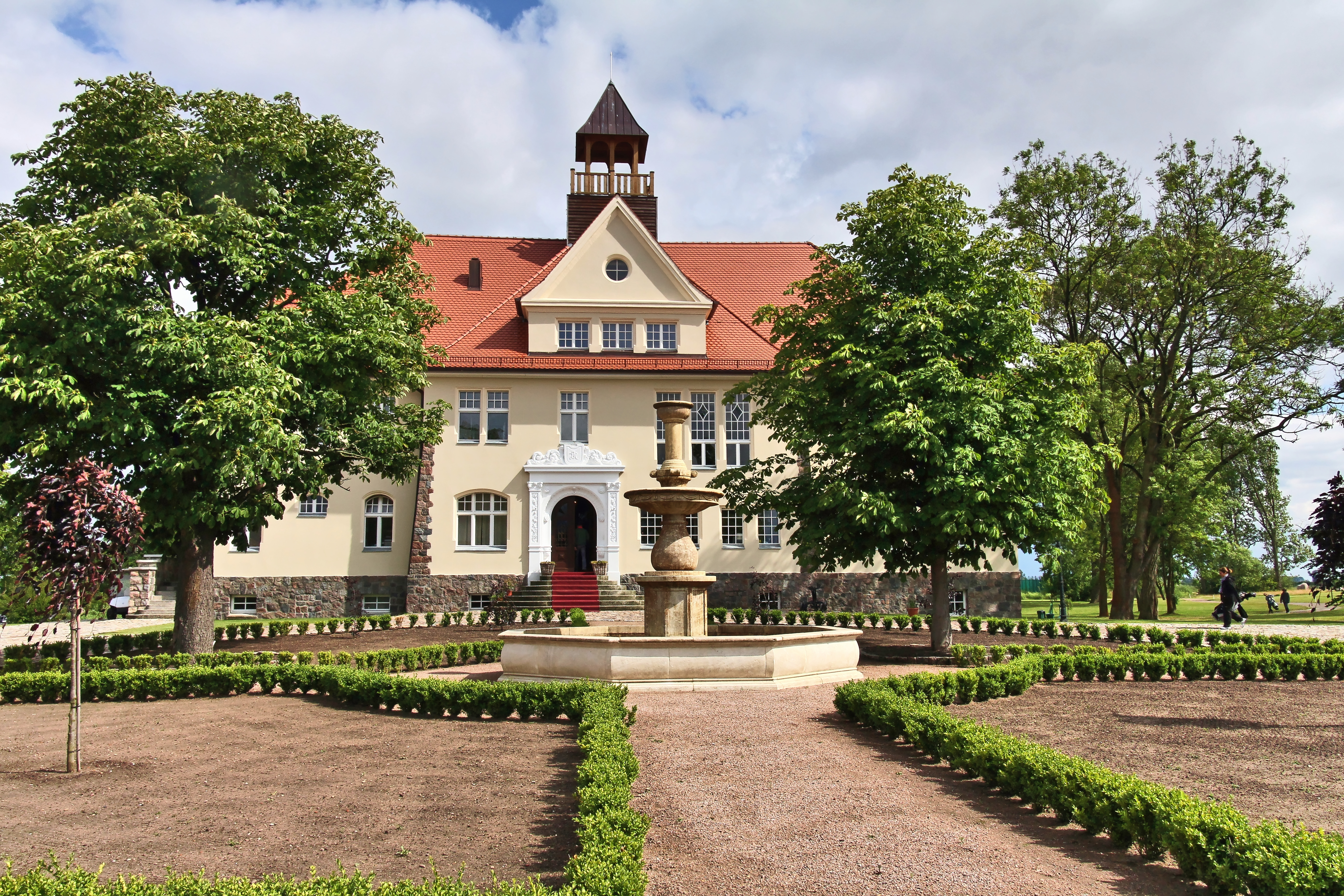 Schloßhotel Krugsdorf in Krugsdorf This is a photograph of an architectural monument.